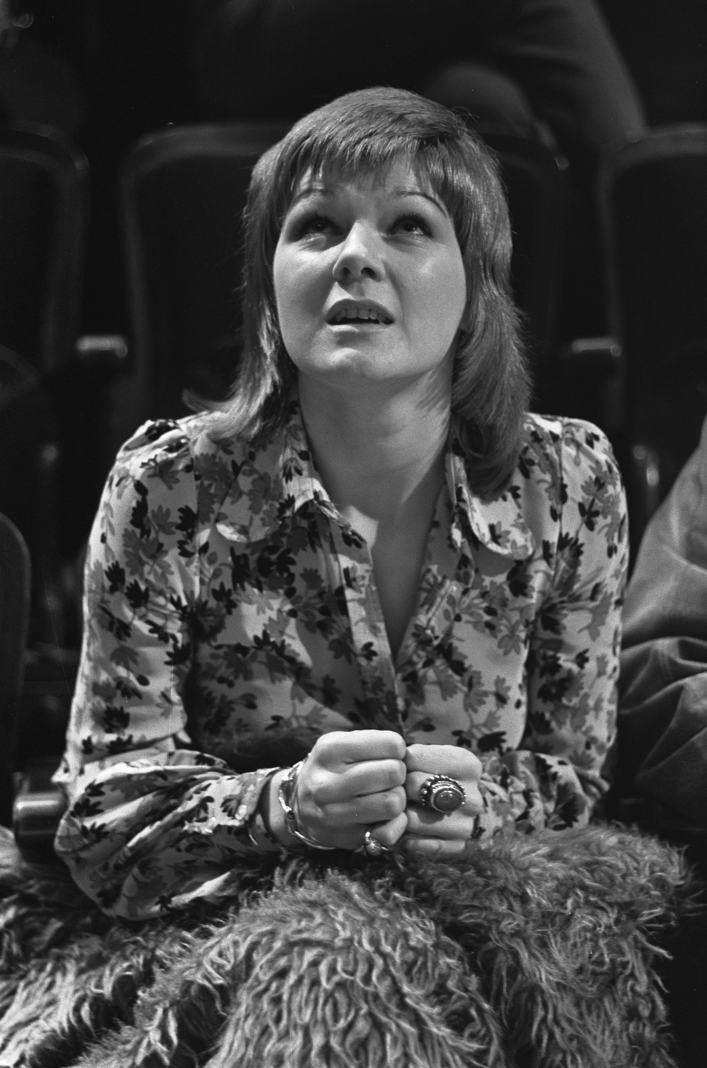 Collectie / Archief : Fotocollectie Anefo Reportage / Serie : [ onbekend ] Beschrijving : Repetitie nationaal songfestival in Carré, Jaap Stobbe als koorddanser, Lenny Kuhr kijkt gespannen toe Datum : 27 februari 1973 Trefwoorden : zangeressen Persoonsnaam : Kuhr, Lenny Fotograaf : Croes, Rob C. / Anefo Auteursrechthebbende : Nationaal Archief Materiaalsoort : Negatief (zwart/wit) Nummer archiefinventaris : bekijk toegang 2.24.01.05 Bestanddeelnummer : 926-2488